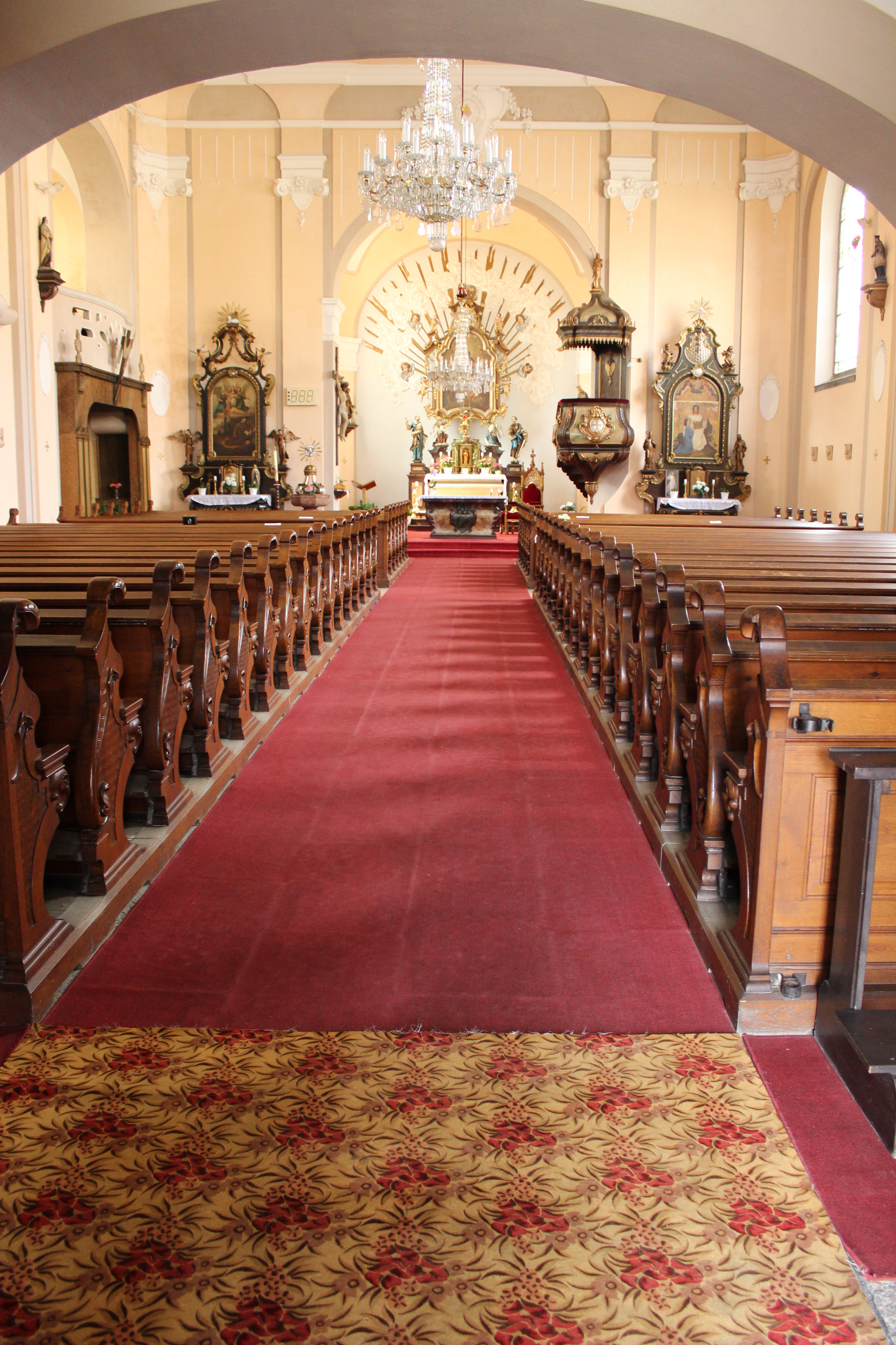 Interiér kostela Nanebevzetí Panny Marie v Raspenavě od vstupu z Fučíkovy ulice.